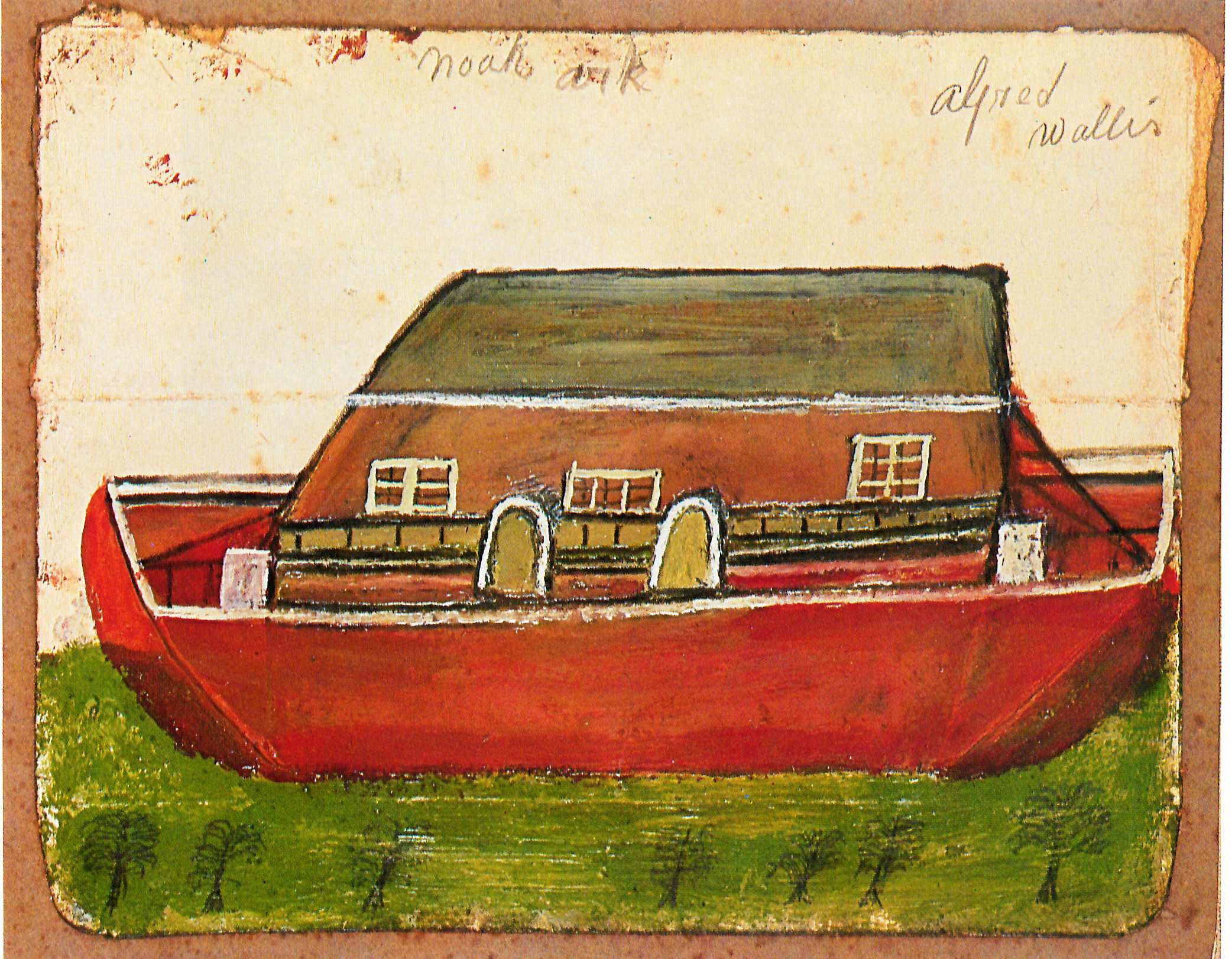 Alfred Wallis: Arche Noah Öl auf Pappe 19x24 cm